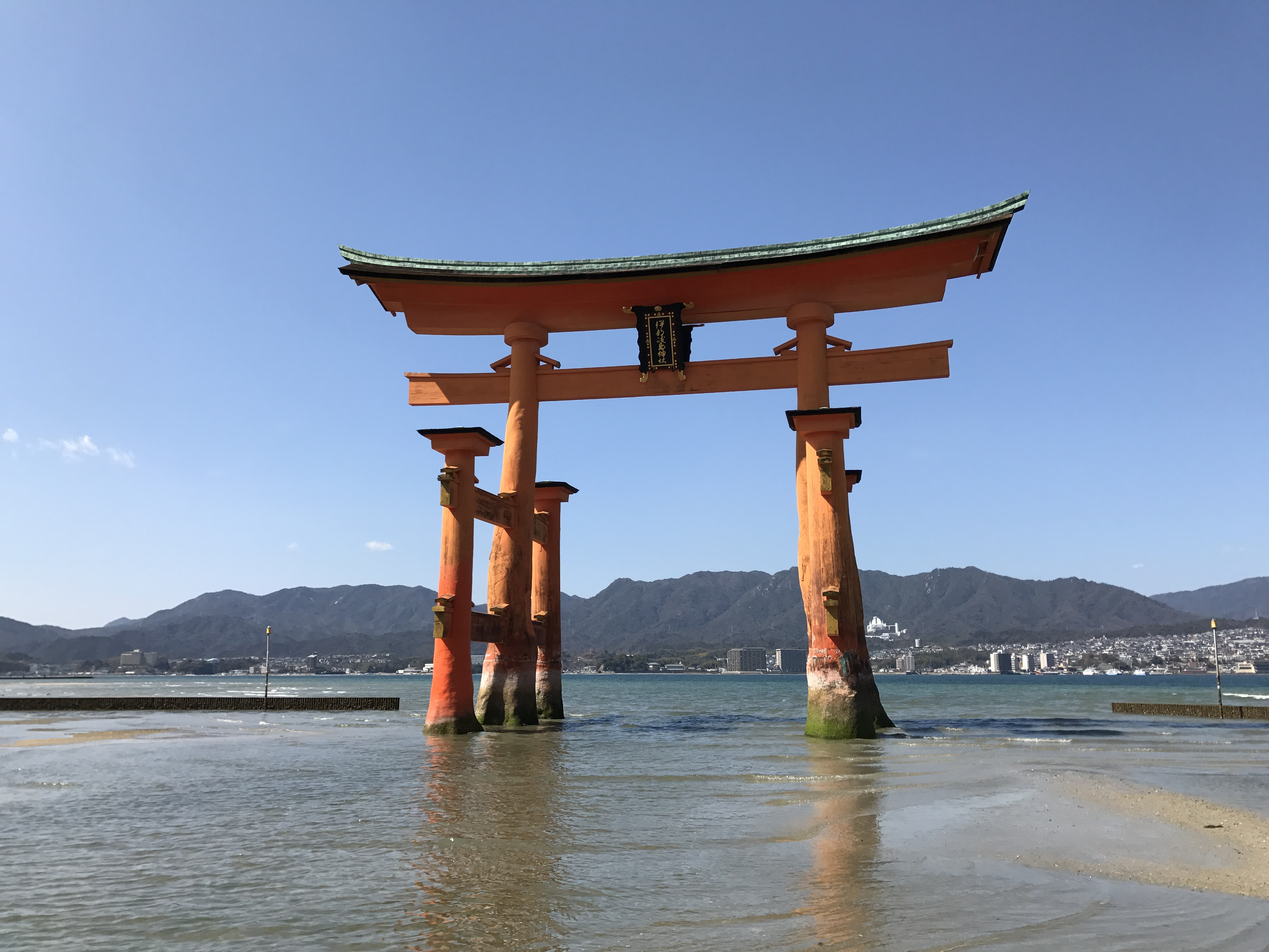 厳島神社の大鳥居